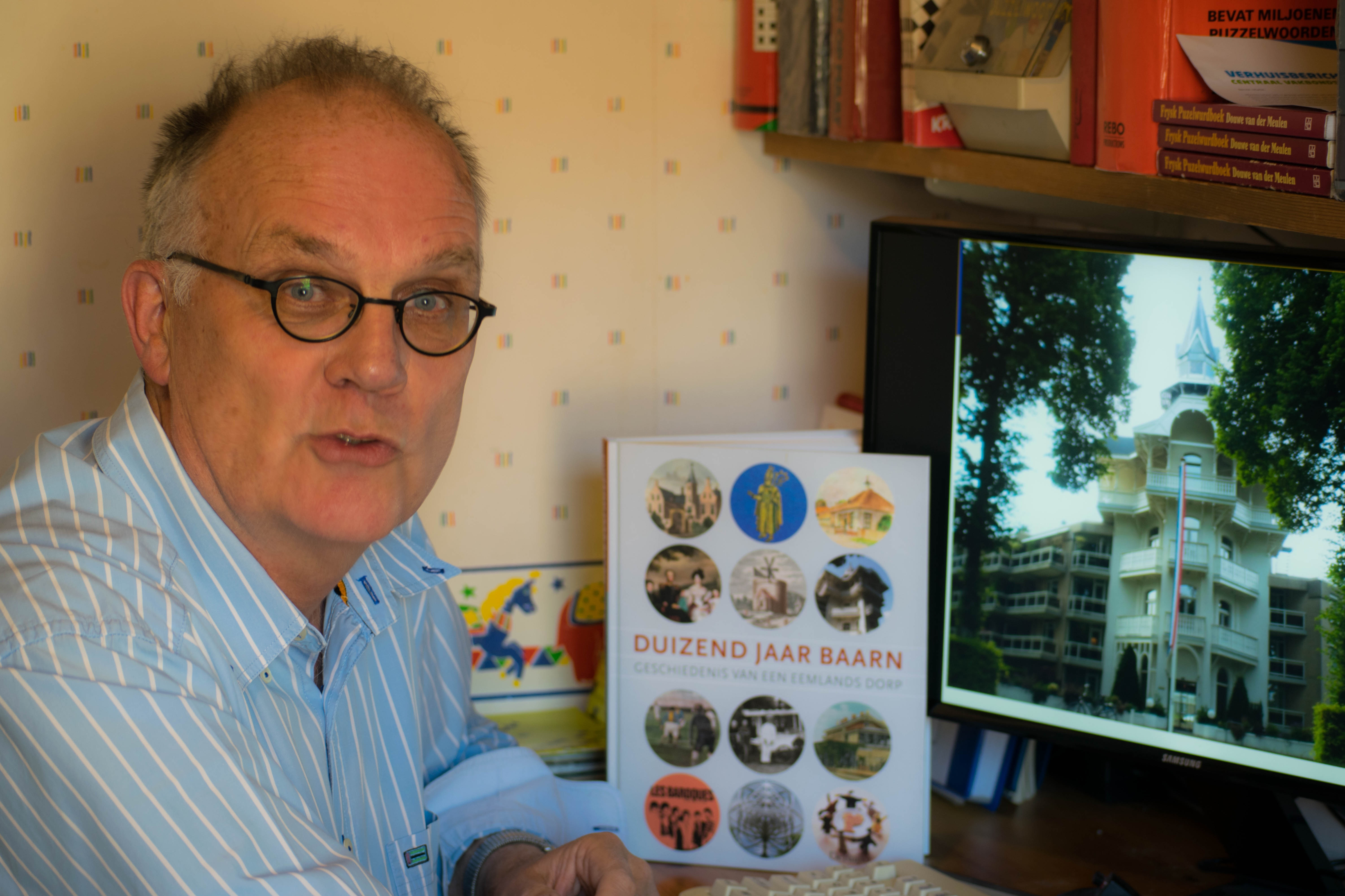 Douwe van der Meulen bezig met het maken van historische routes.Hier met het Badhotel.